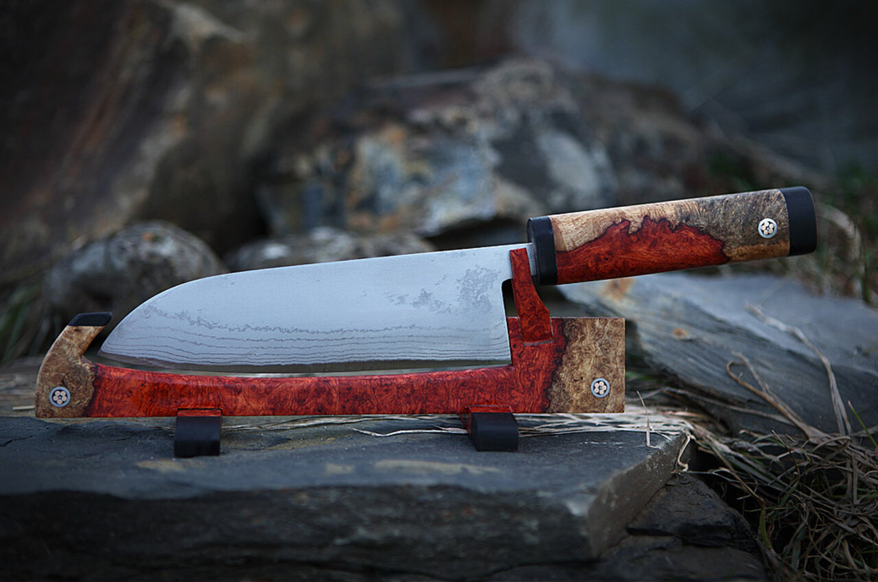 Ein Santoku-Kochmesser mit Amboina-Maserholzständer von Holger Müller